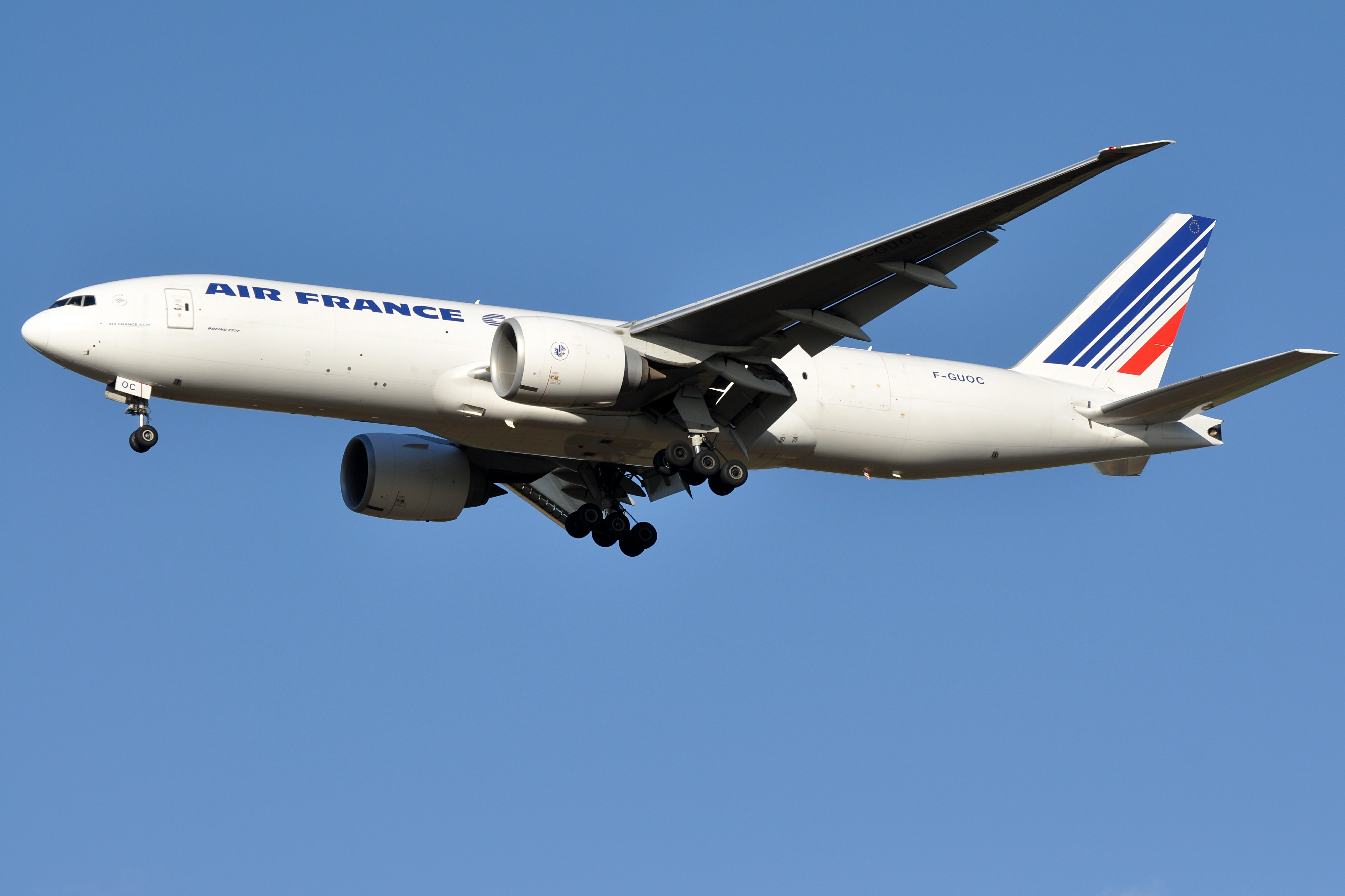 MSN 32966 B777-F28 AIR FRANCE CDG